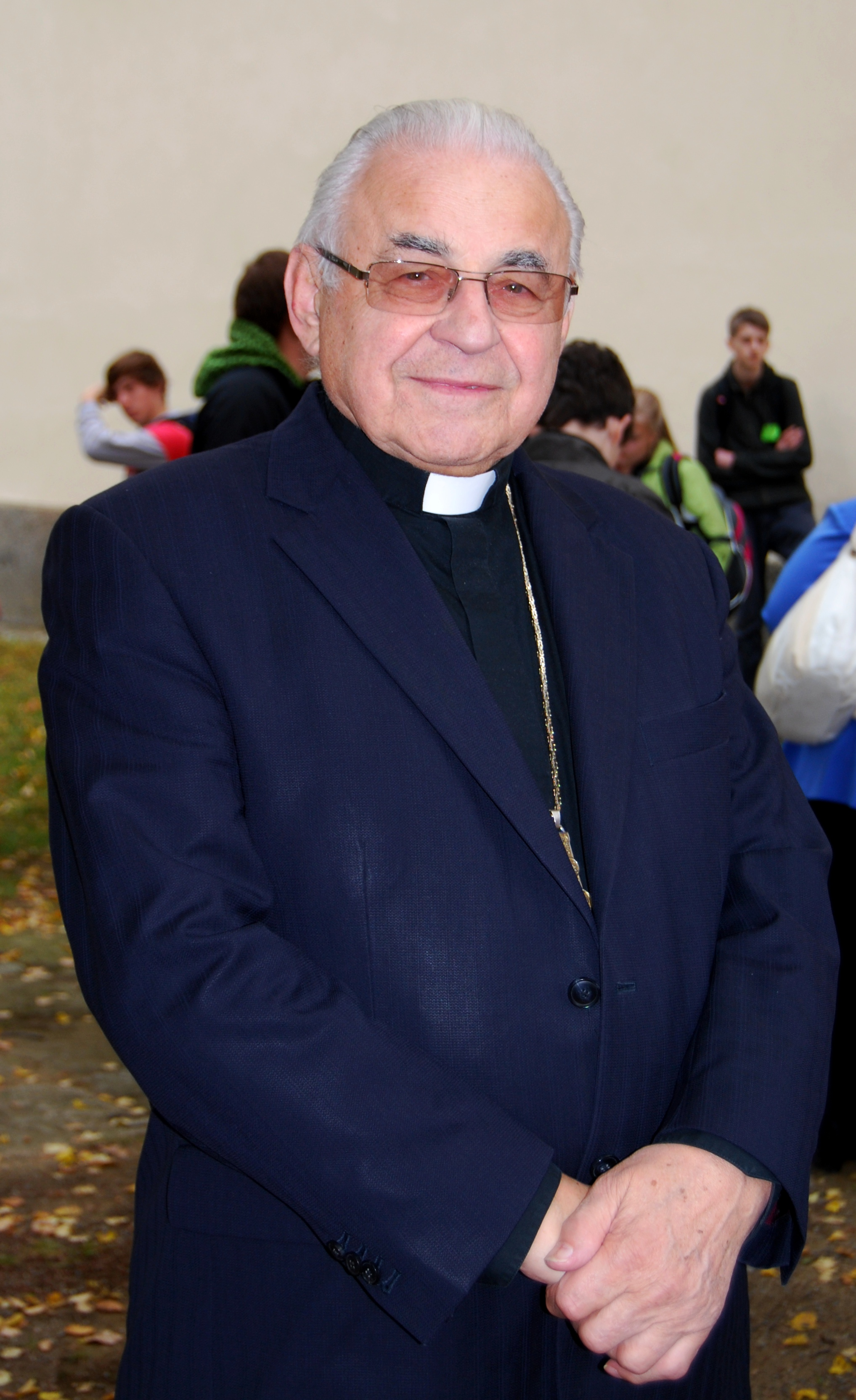 PhDr. Miloslav kardinál Vlk na Vikariátním setkání mládeže v Krásné Hoře nad Vltavou. Krásná Hora nad Vltavou. Okres Příbram. Česká republika.